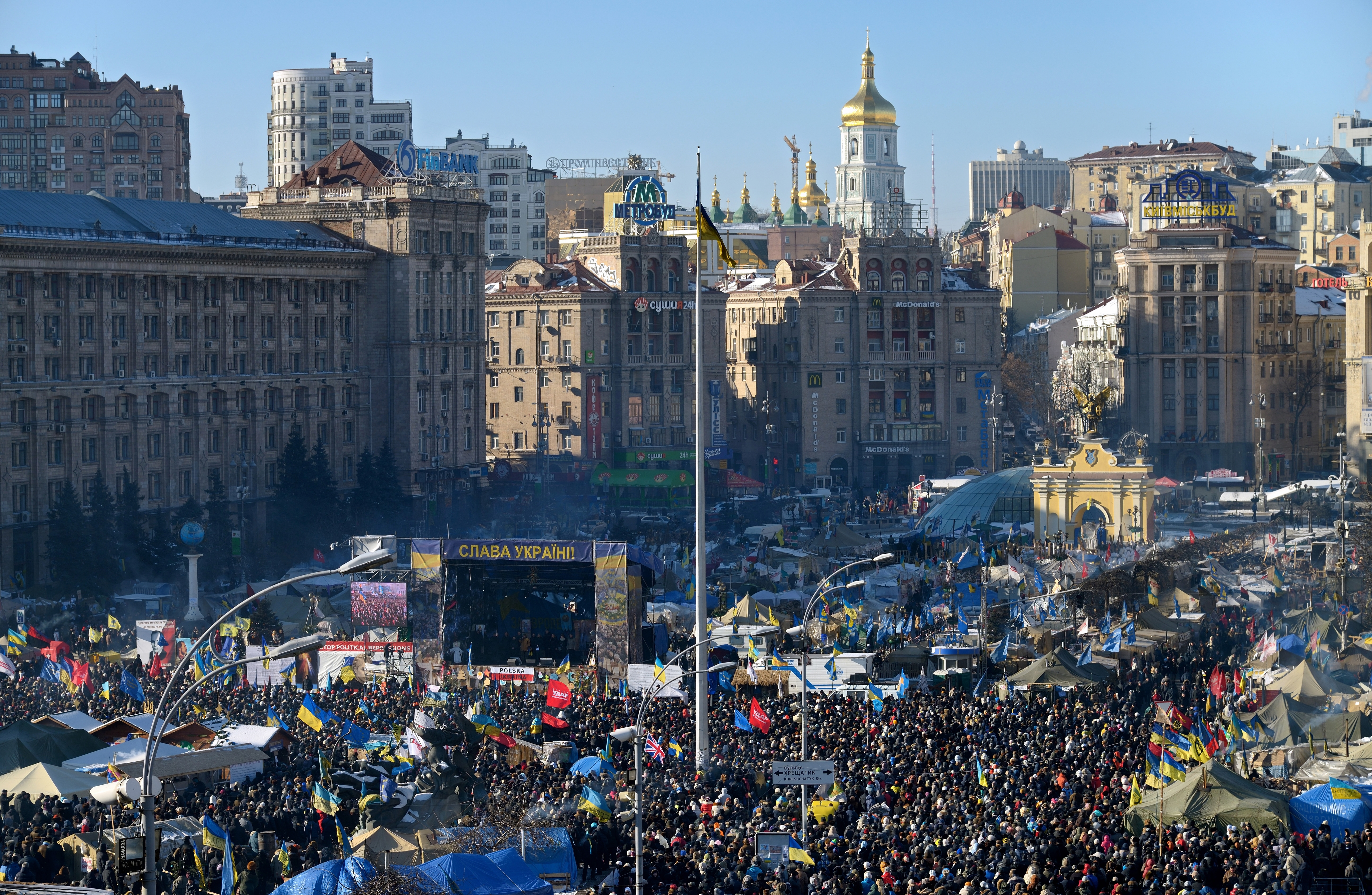 Євромайдан 02 лютого 2014 Київ: Мітинг на Євромайдані у Київі 02 лютого 2014 року